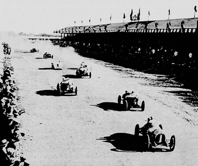 Départ du Grand Prix de l'ACF 1923 (Le Monde Illustré du 7 juillet 1923, p.13).